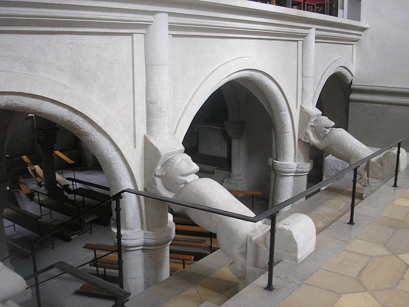 Ehemalige Stiftskirche St. Vitus (Ellwangen a.d. Jagst, BW). Blick in die Krypta. Eigene Aufnahme, Aug. 2006 / St. Vitus, Ellwangen a.d. Jagst, Baden-Wuerttemberg, Germany. View into the crypt. Own photo, Aug. 2006